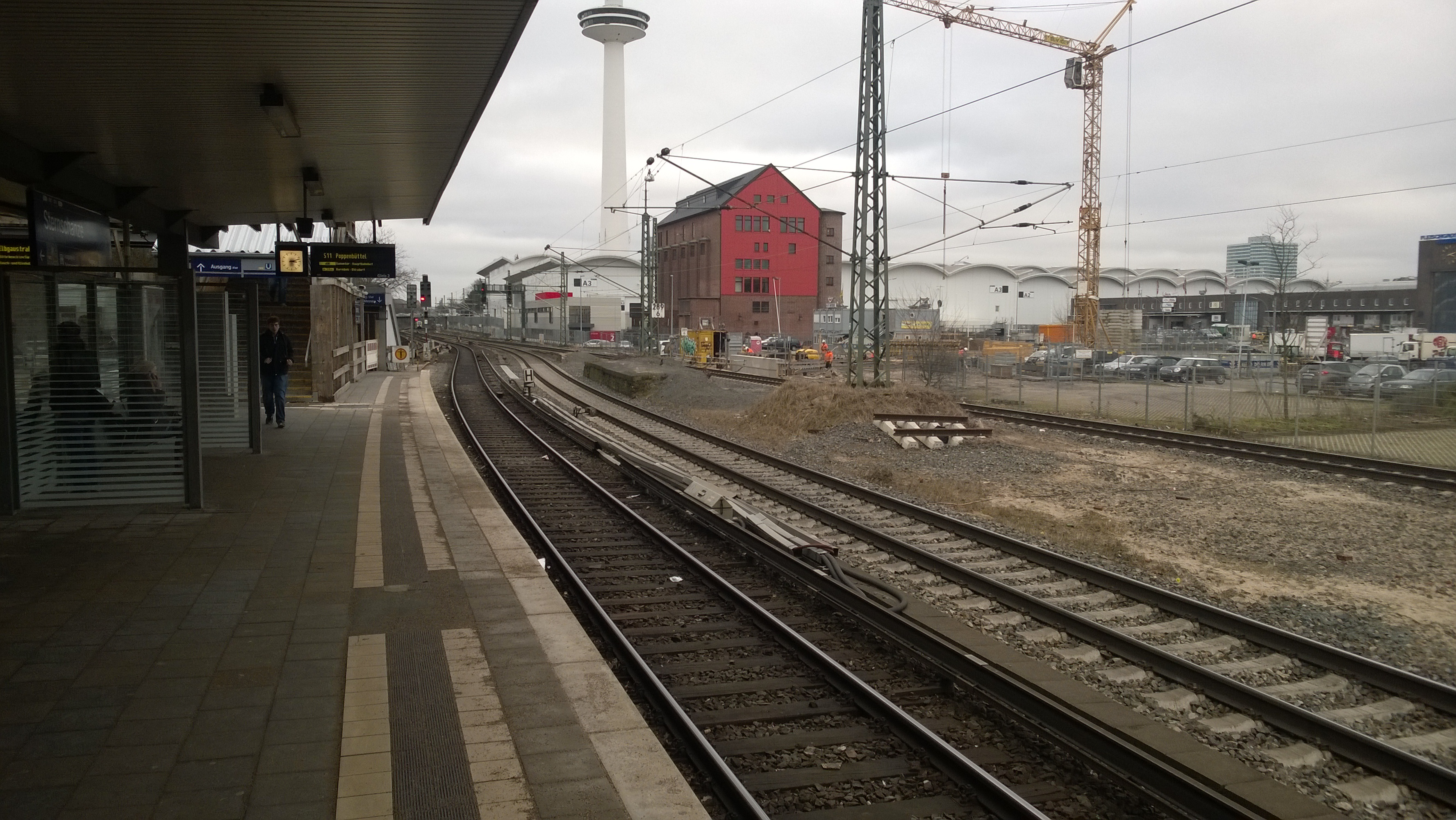 Die Lage des 2. Bahnsteigs ist noch anhand der Gleisverläufe sowie marginalen Resten zu erkennen.